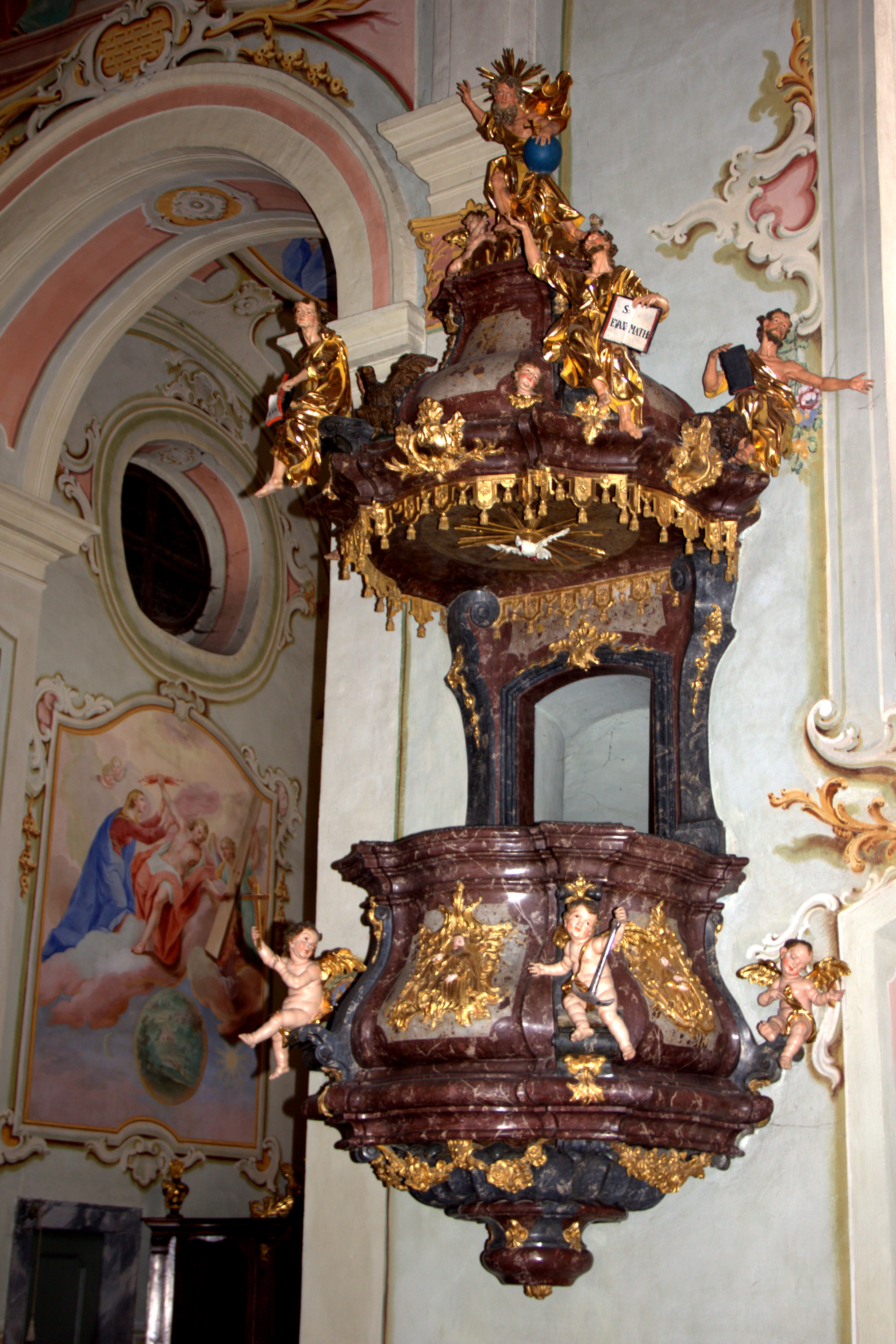 Kath. Filialkirche Maria Lebing,Kanzel